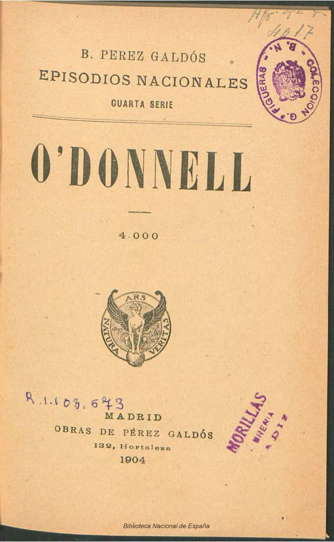 O'Donnell ; B. Pérez Galdós Autor: Pérez Galdós, Benito (1843-1920) Fecha: 1904 Datos de edición: Madrid, Obras de Pérez Galdós, Est. Tip. de la Viuda e Hijos de Tello